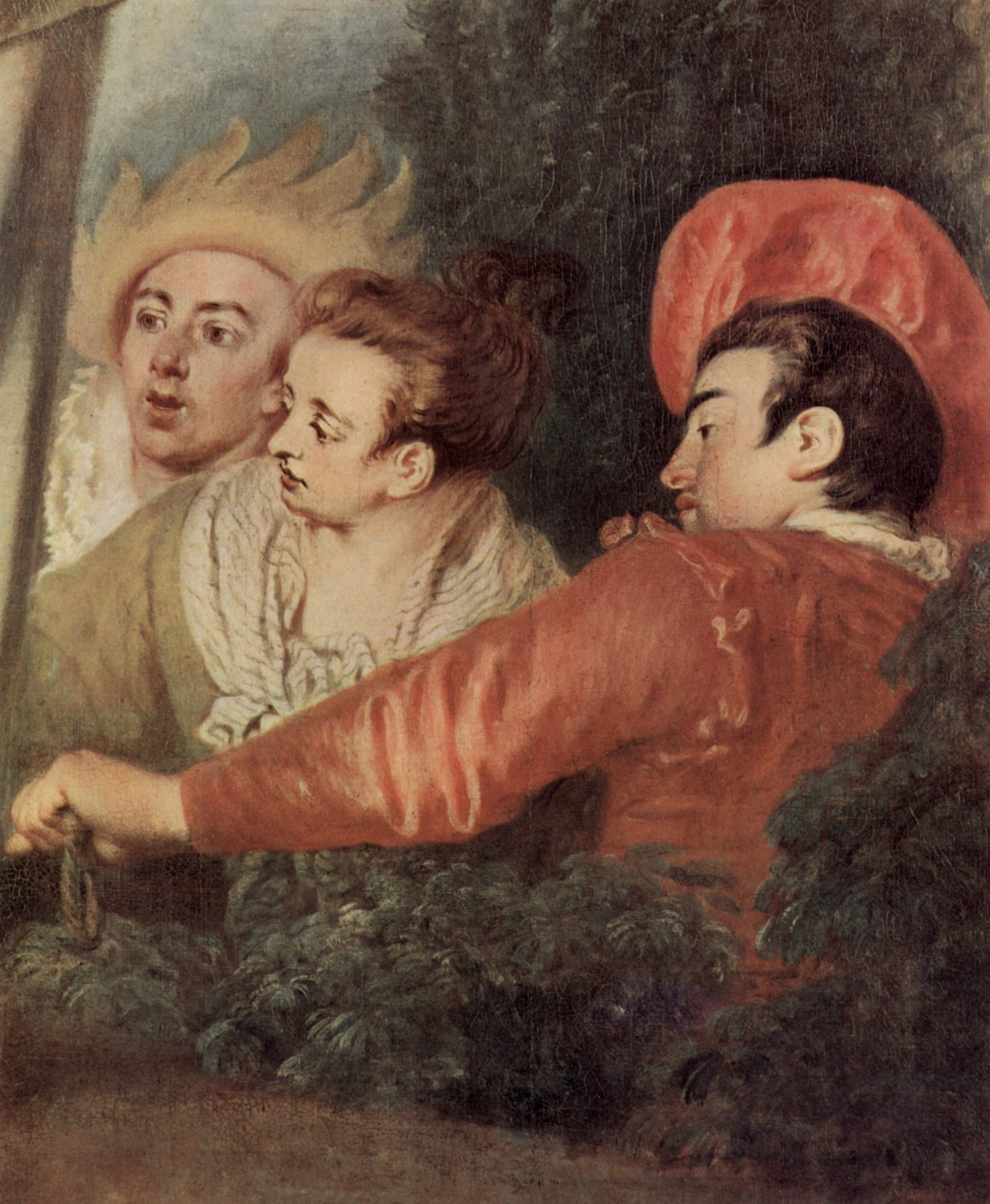 detail